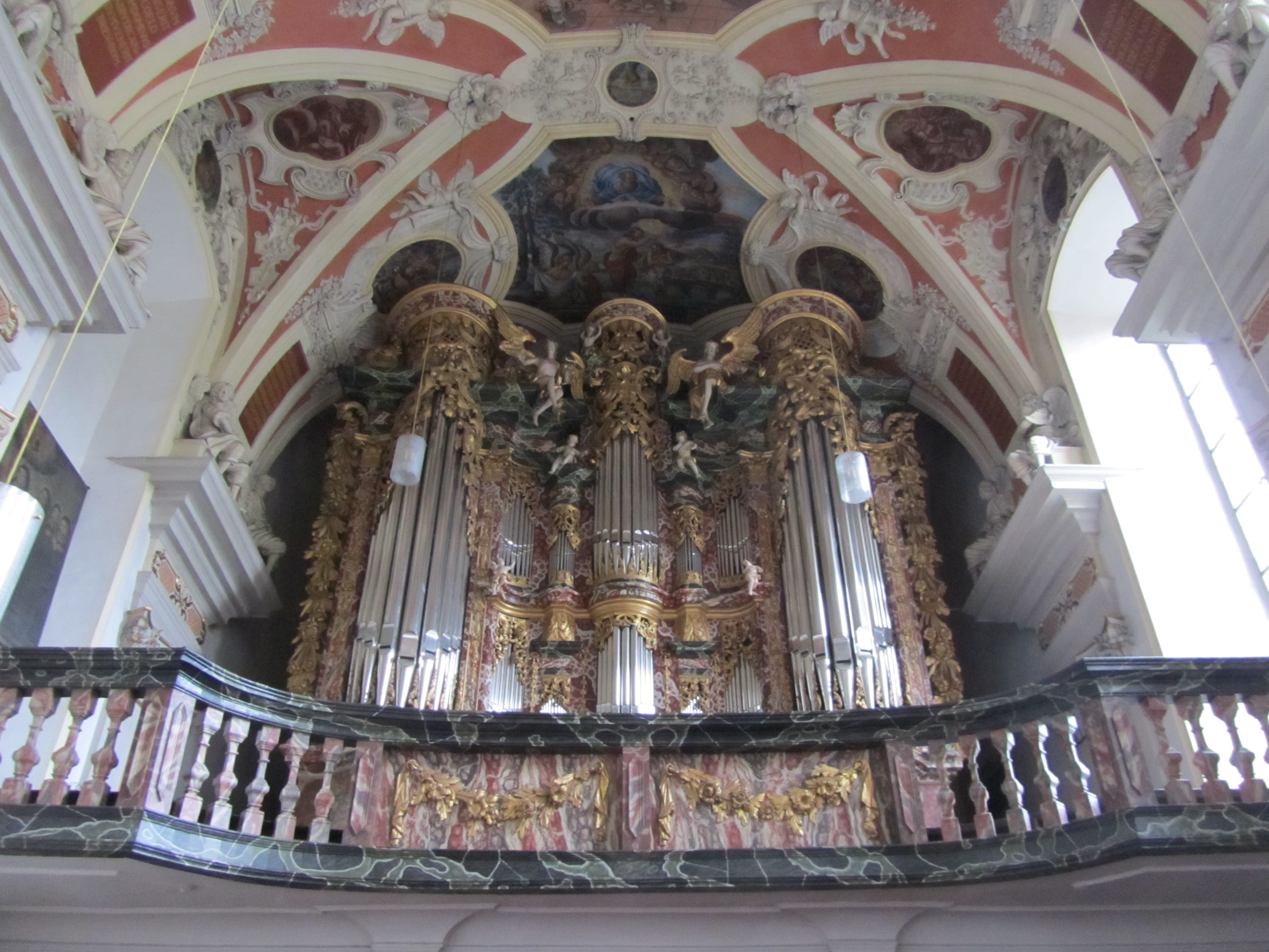 Die Orgel der Cruciskirche/Neuwerkskirche in Erfurt.